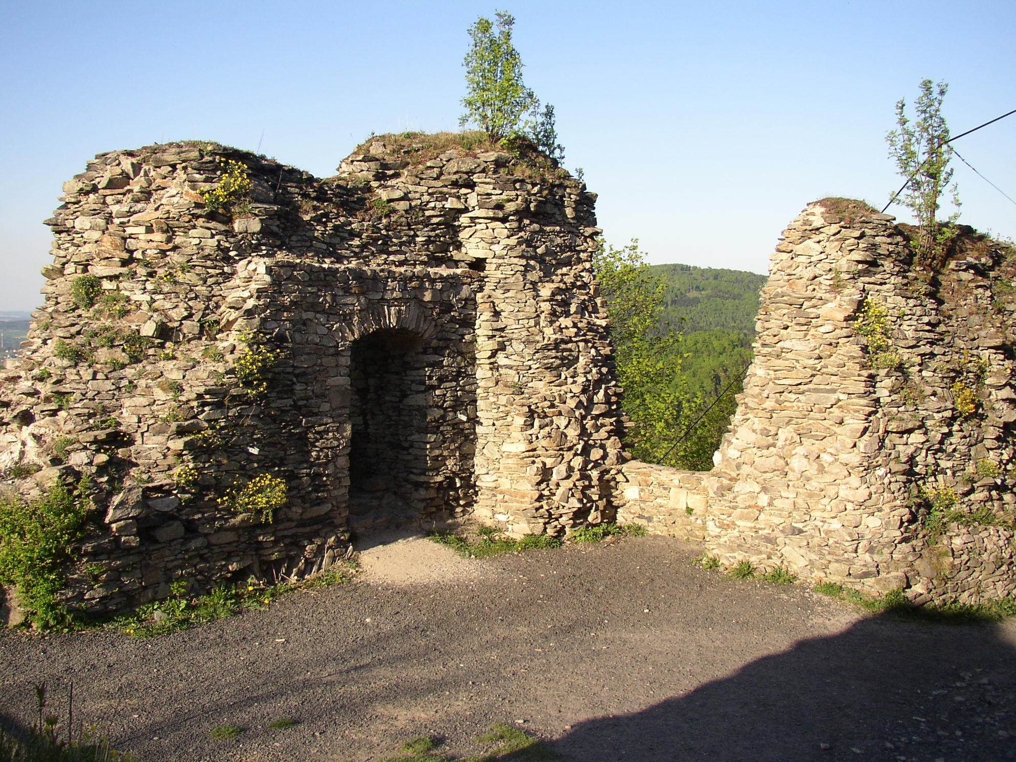 Zbytky hranolové bašty na Tolštejně